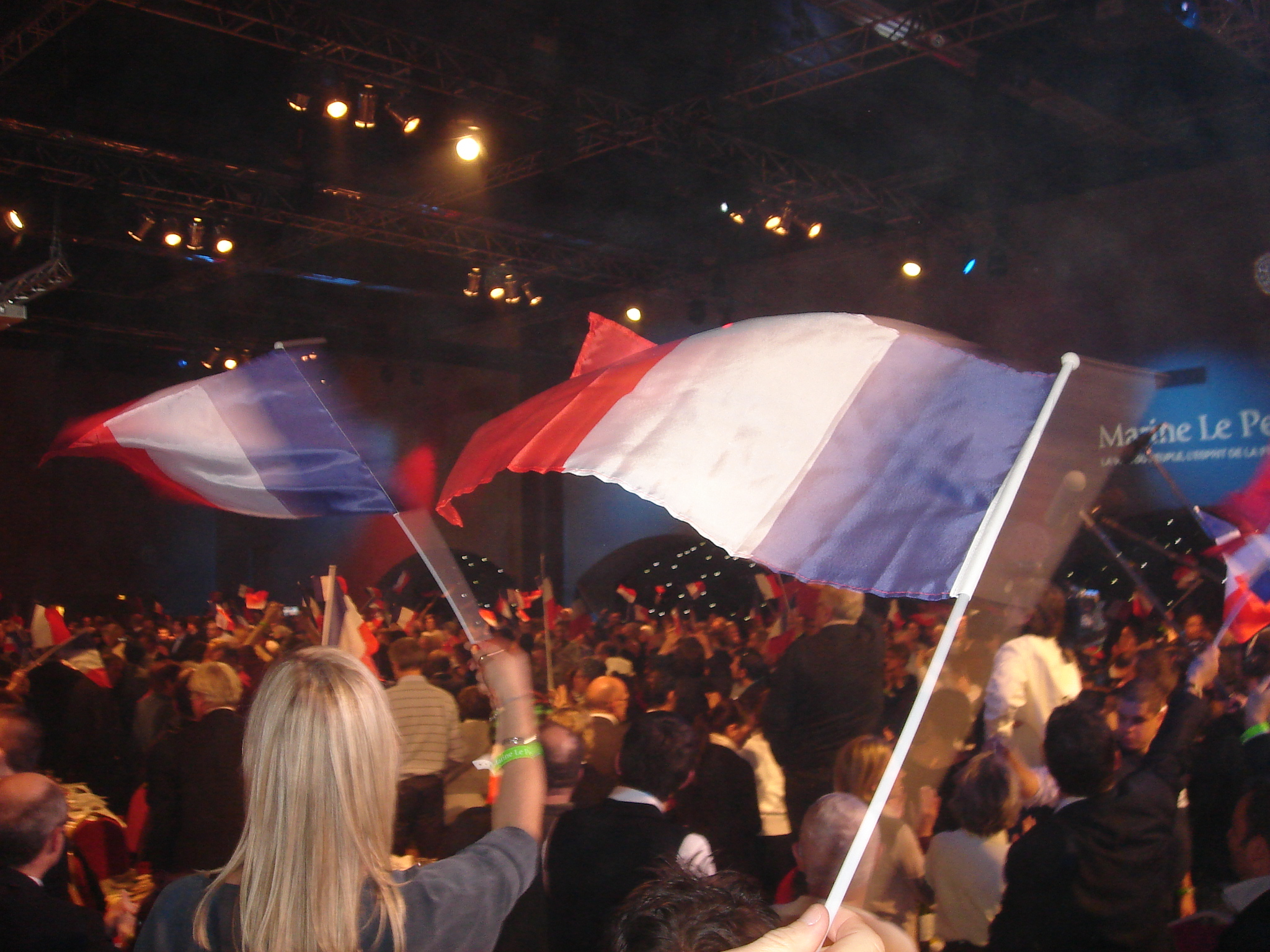 Présentation du programme présidentiel de Marine Le Pen, samedi 19 novembre 2011, Banquet des mille, salle Équinoxe, Paris.